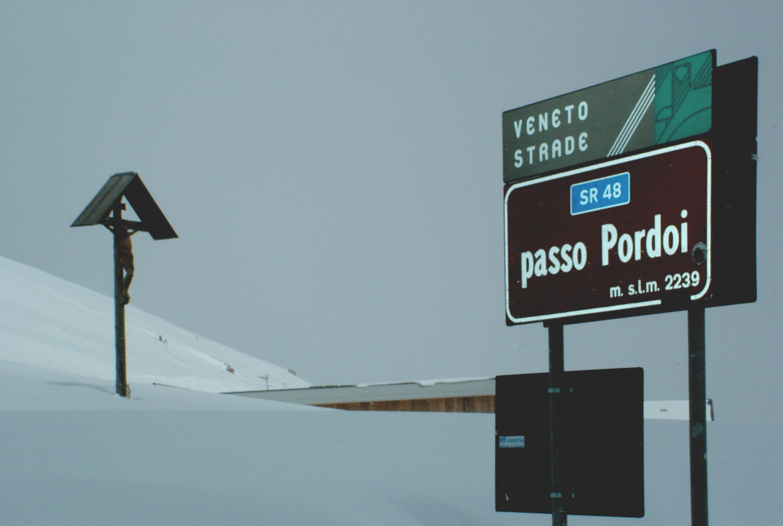 Pordoi-hágó, olasz Alpok